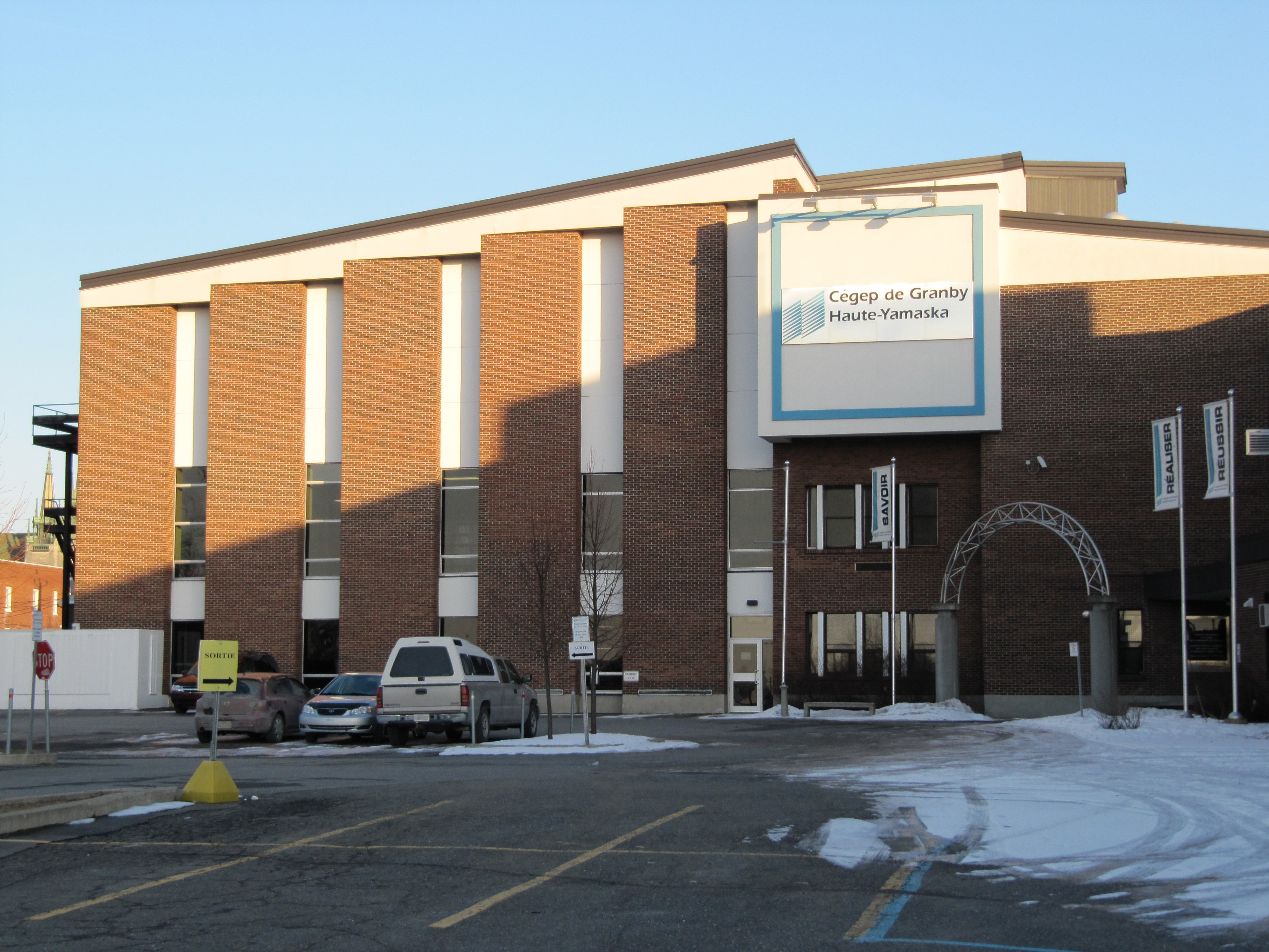 Cégep de Granby Haute-Yamaska - Entrée #13